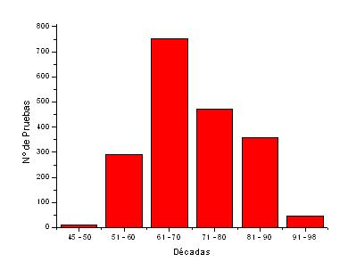 Gráfico de creación propia